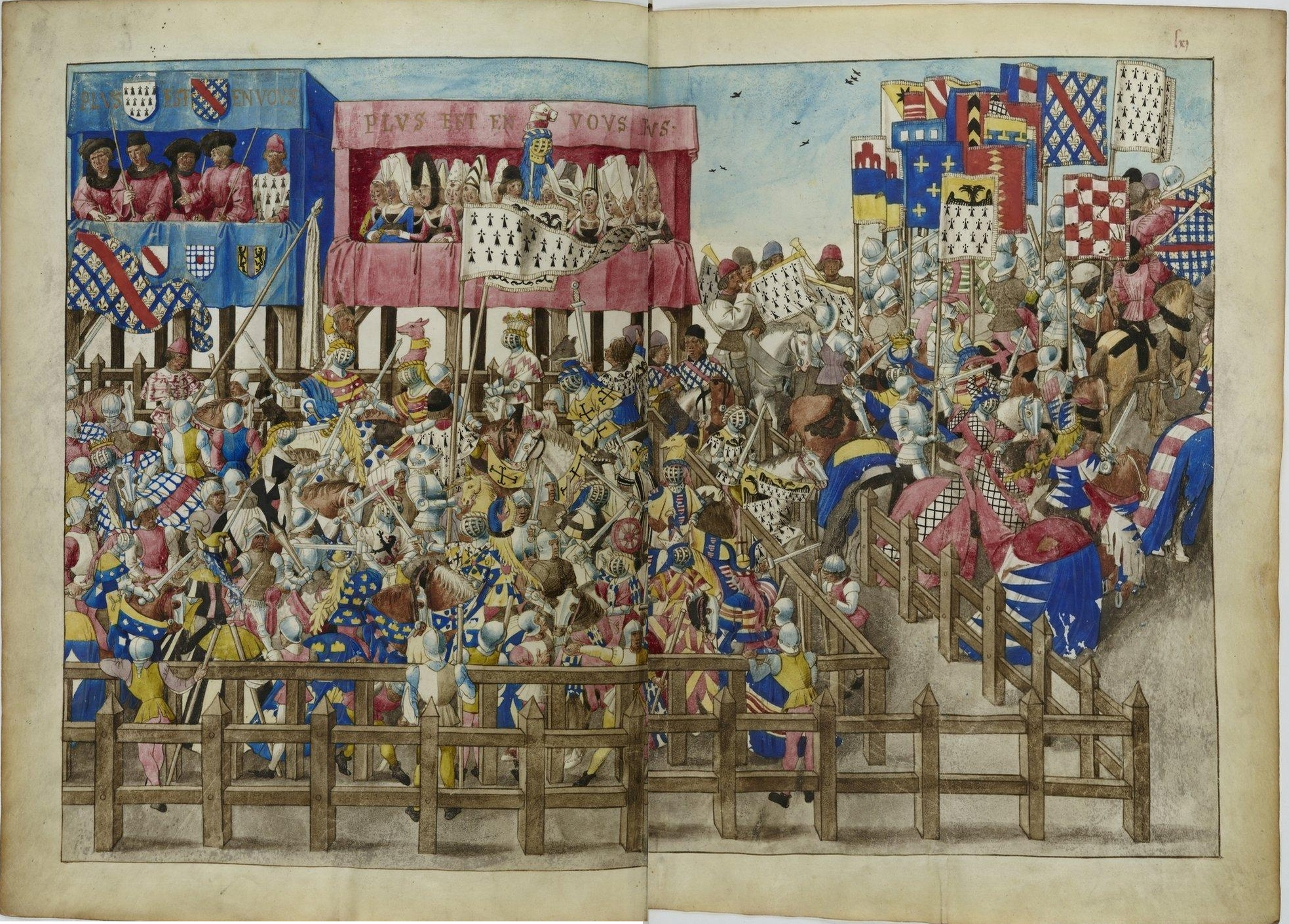 Turnierbuch des René von Anjou, Paris, Bibliothèque nationale, Ms. fr. 2693